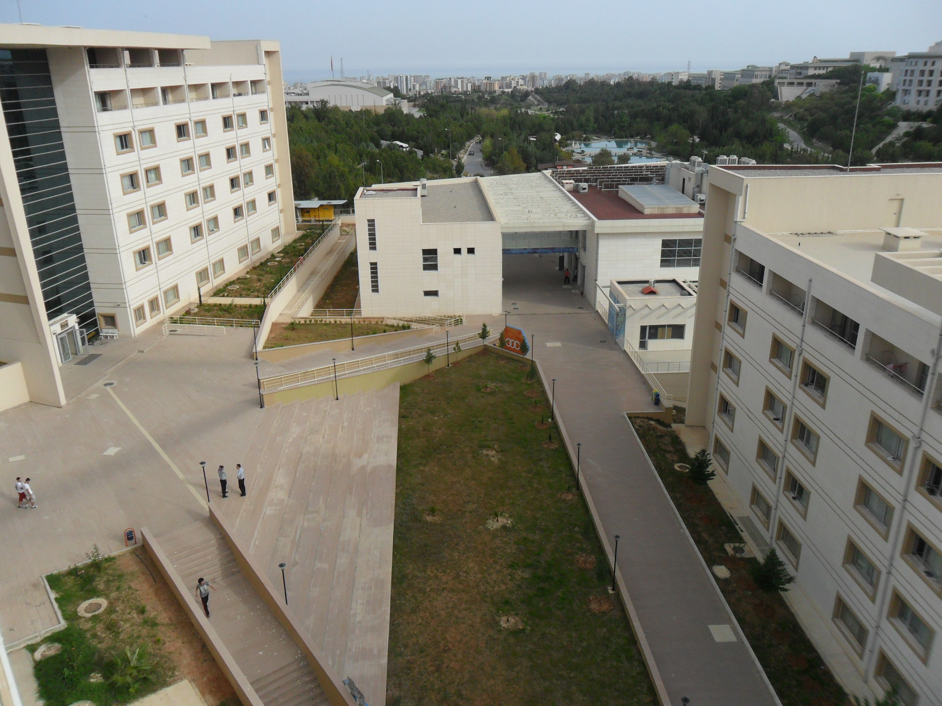 Mersin Üniversitesi Çiftlikköy Kampüsü içerisinde yer alan devlet erkek öğrenci yurdunun avlusu.